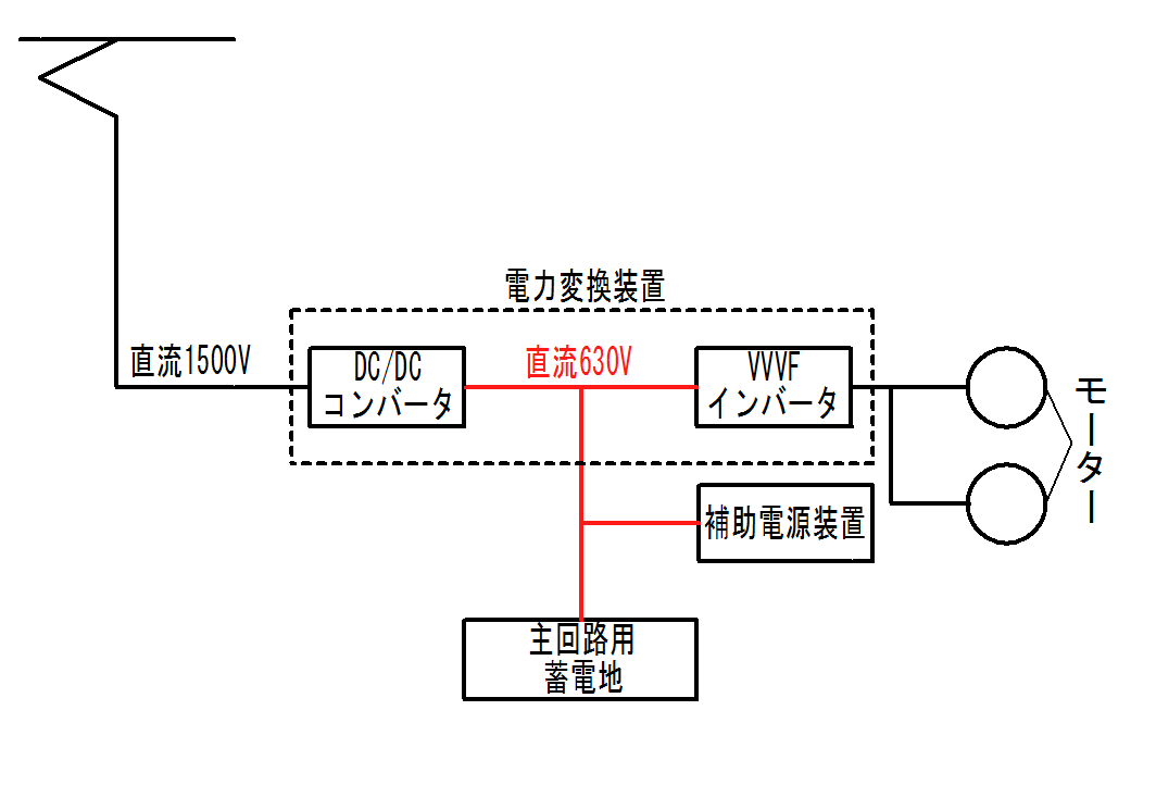 EV-E301系直流用蓄電池駆動電車の主回路の見取り図。